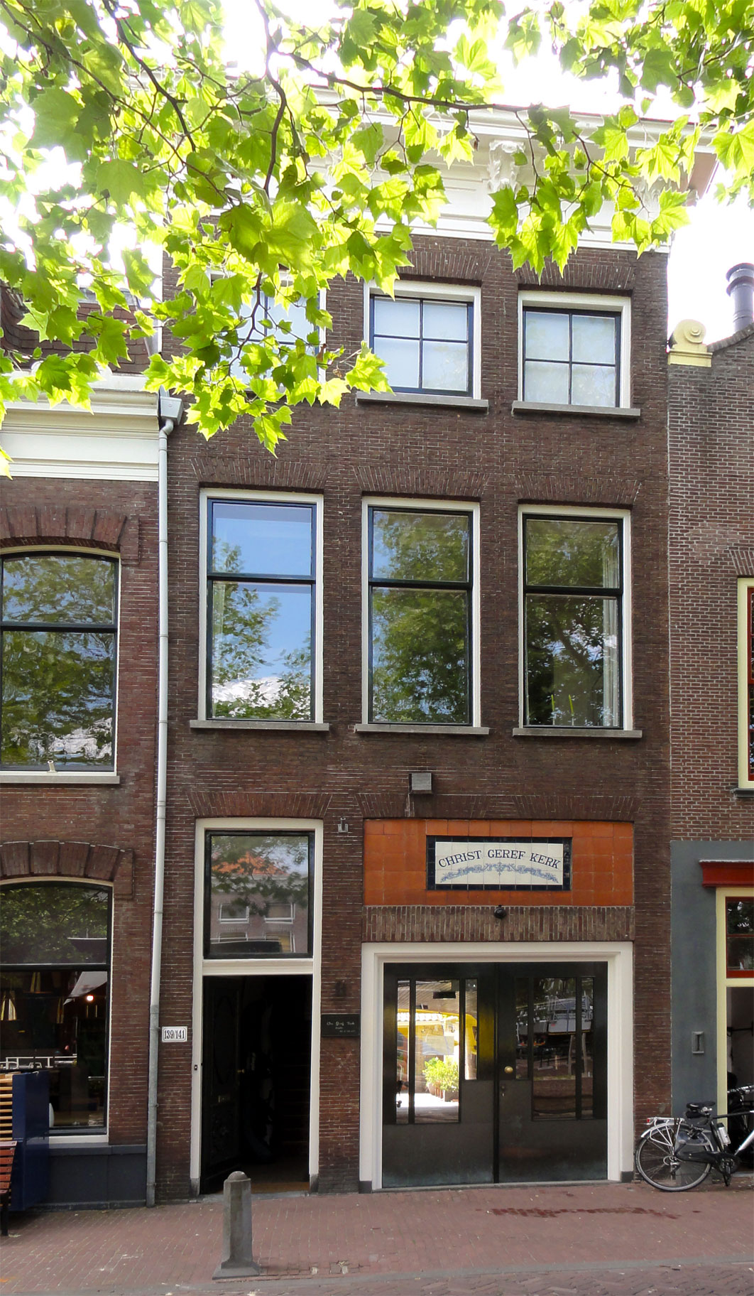 Hoge Gouwe 139/141 Christelijk Gereformeerde Kerk Gouda, rijksmonument